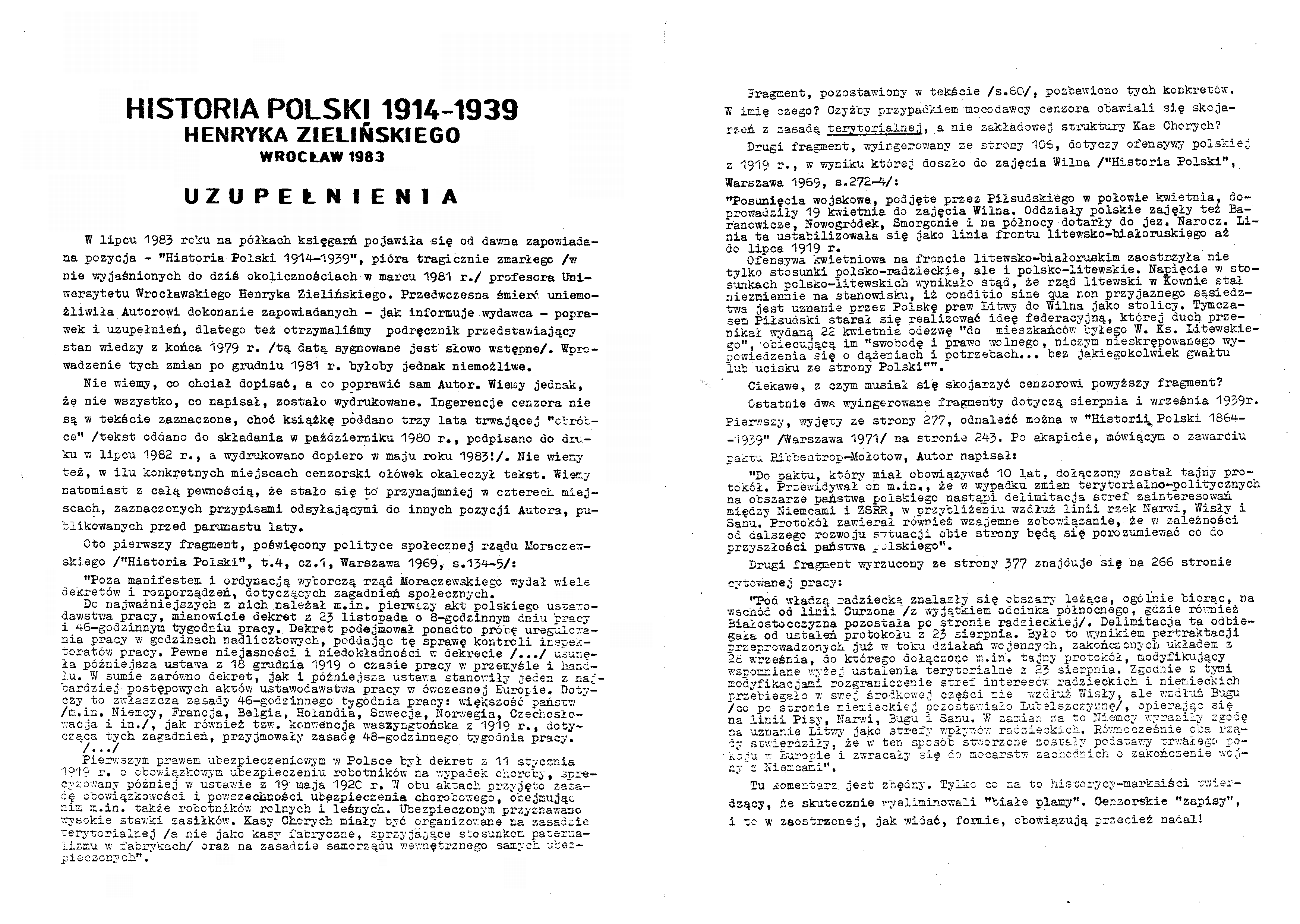 Skan z obu stron ulotki, kolportowanej nielegalnie jako załącznik do książki "Historia Polski 1914-1939" autorstwa Henryka Zielińskiego. Sama książka była wydrukowana, po licznych cięciach cenzury, w 1983 roku w Prasowych Zakładach Graficznych we Wrocławiu, natomiast pracownicy tej drukarni wydrukowali ten załącznik w porozumieniu z uczniami prof. Zielińskiego, którzy go przygotowali merytorycznie na podstawie notatek autora oraz jego i jego rodziny korespondencji z Urzędem Cenzury.